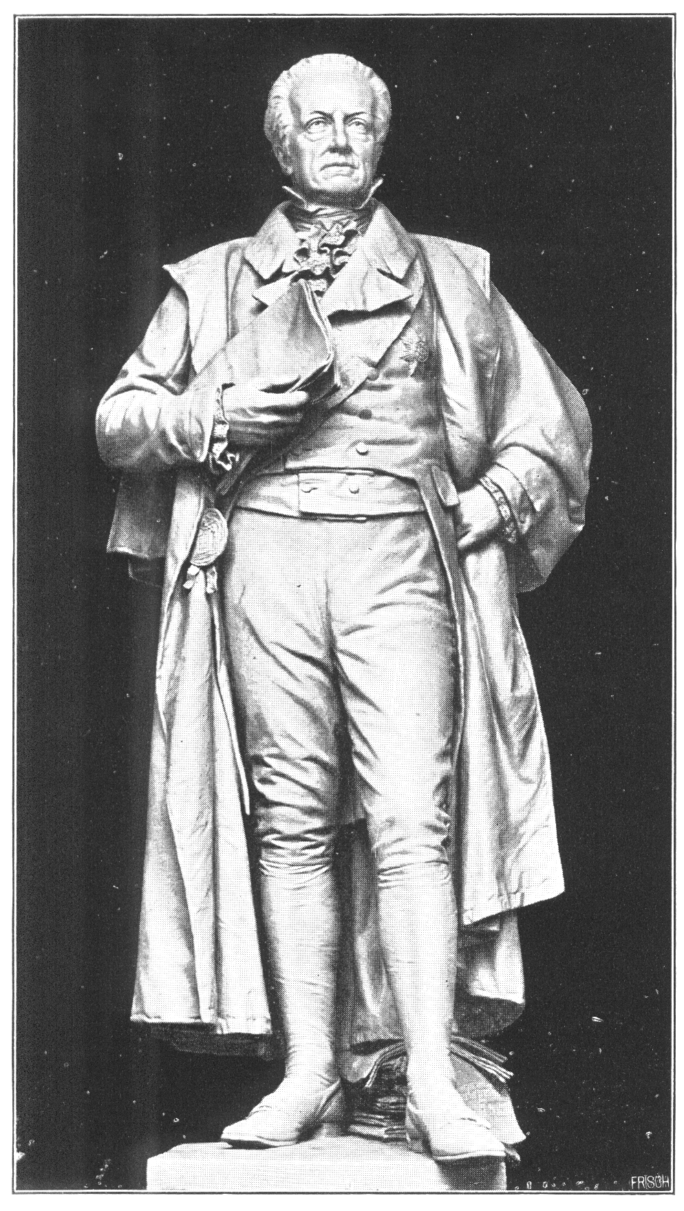 Hardenberg-Denkmal in Berlin/Dönhoffplatz